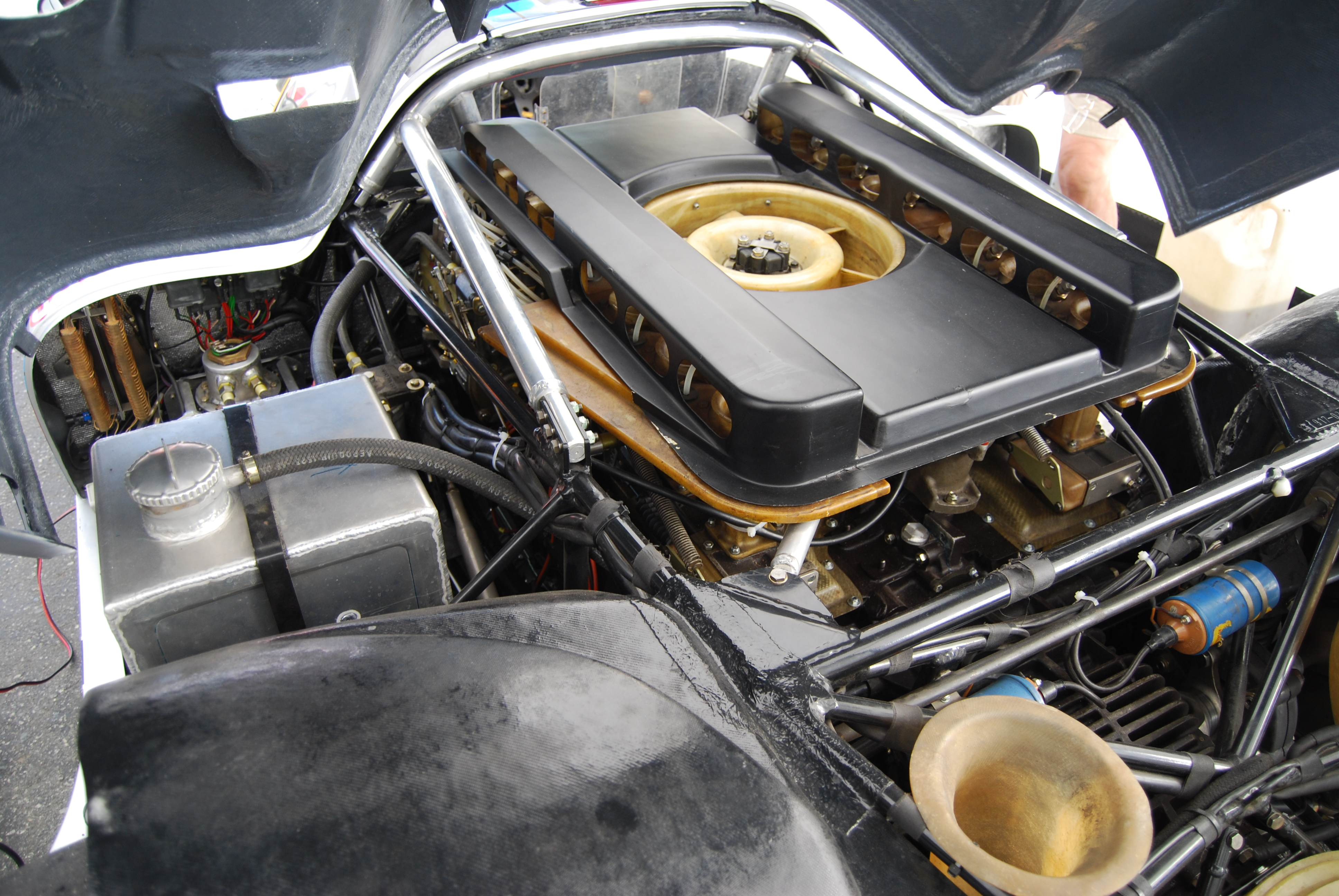 7c1_DSC_0433